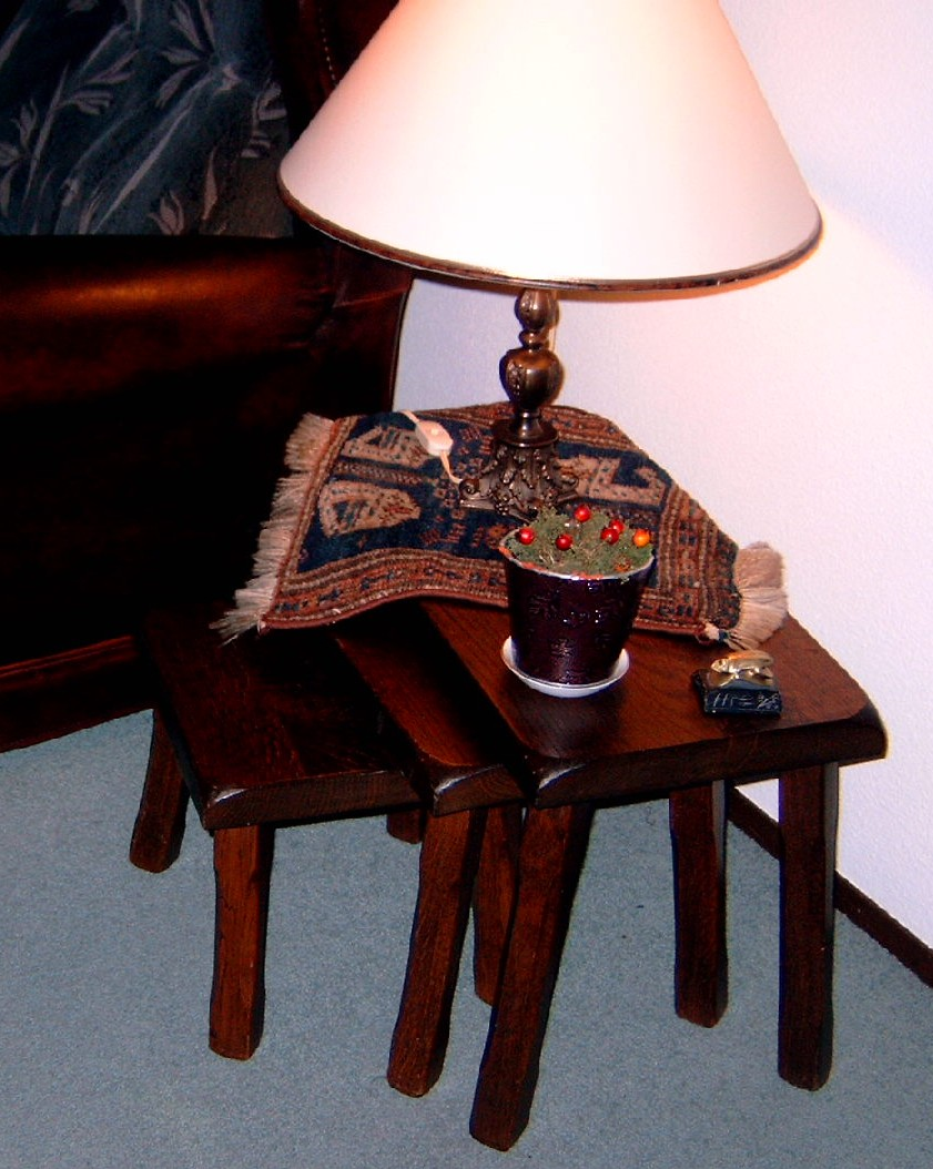 Set van 3 eikenhouten bijzettafeltjes. Eigen opname.